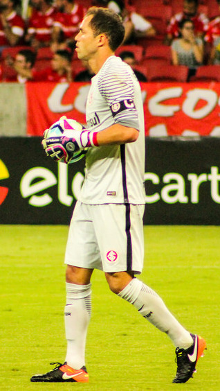 Marcelo Lomba em partida do Inter de 2017